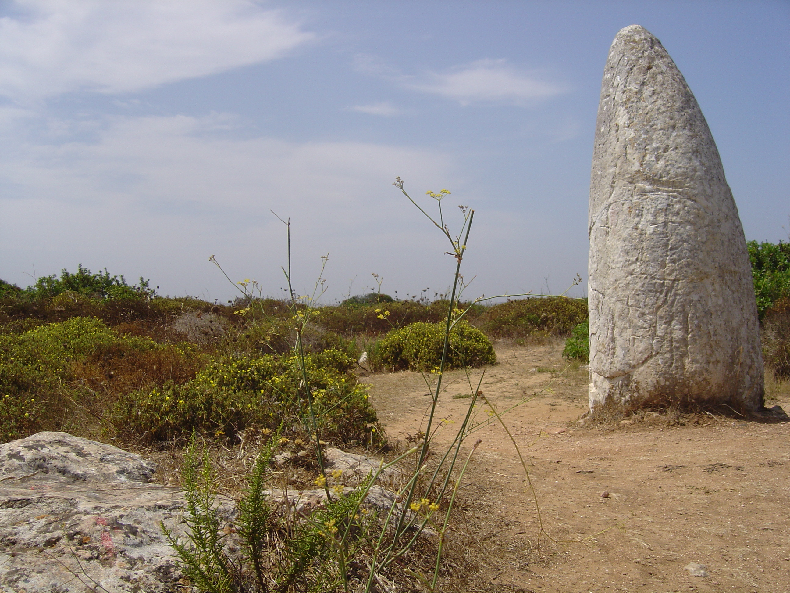 Menir de Aspradantes encontrado na estrada municipal que liga a Raposeira à praia da Ingrina.